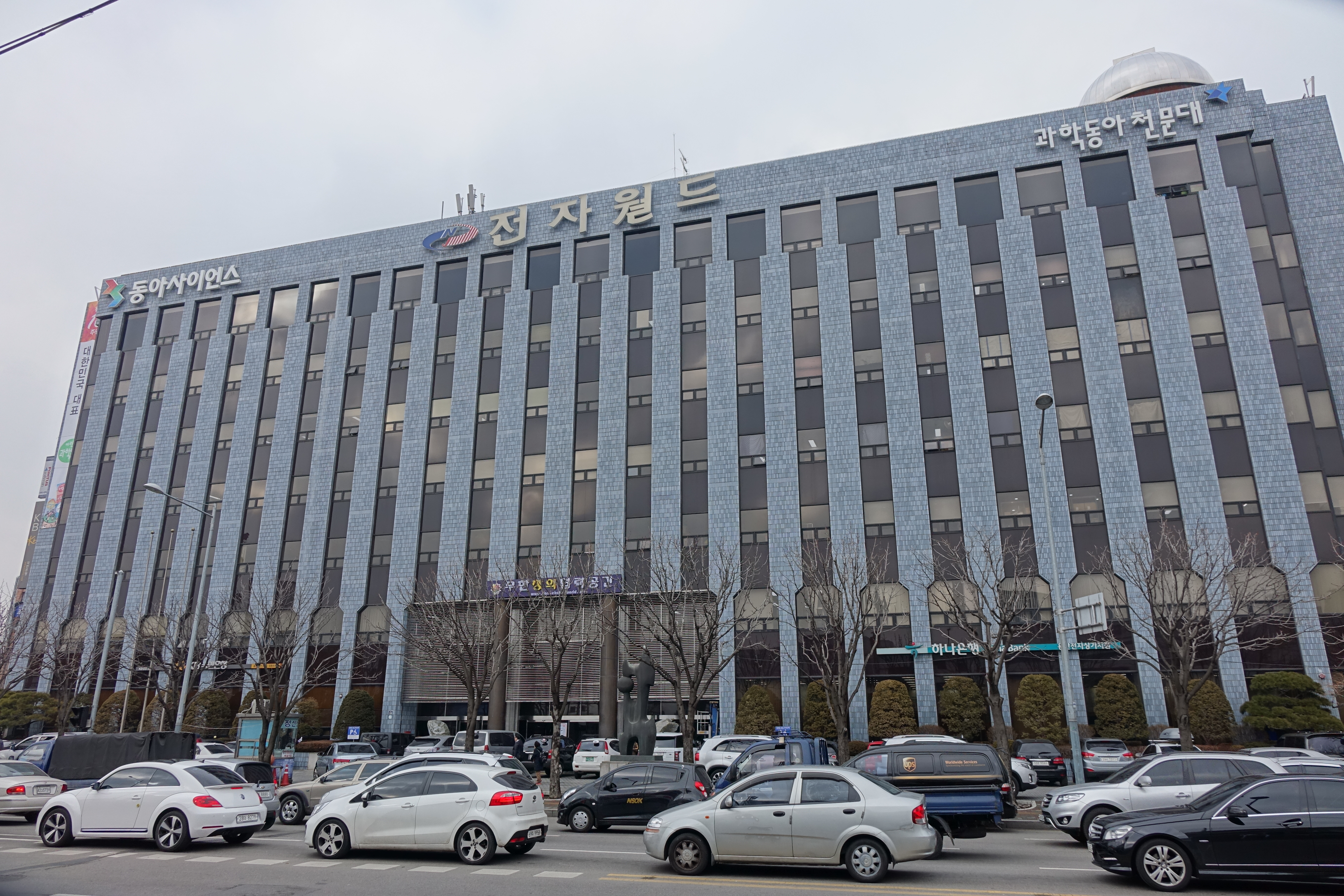 2015년 1월 27일 최광모 촬영